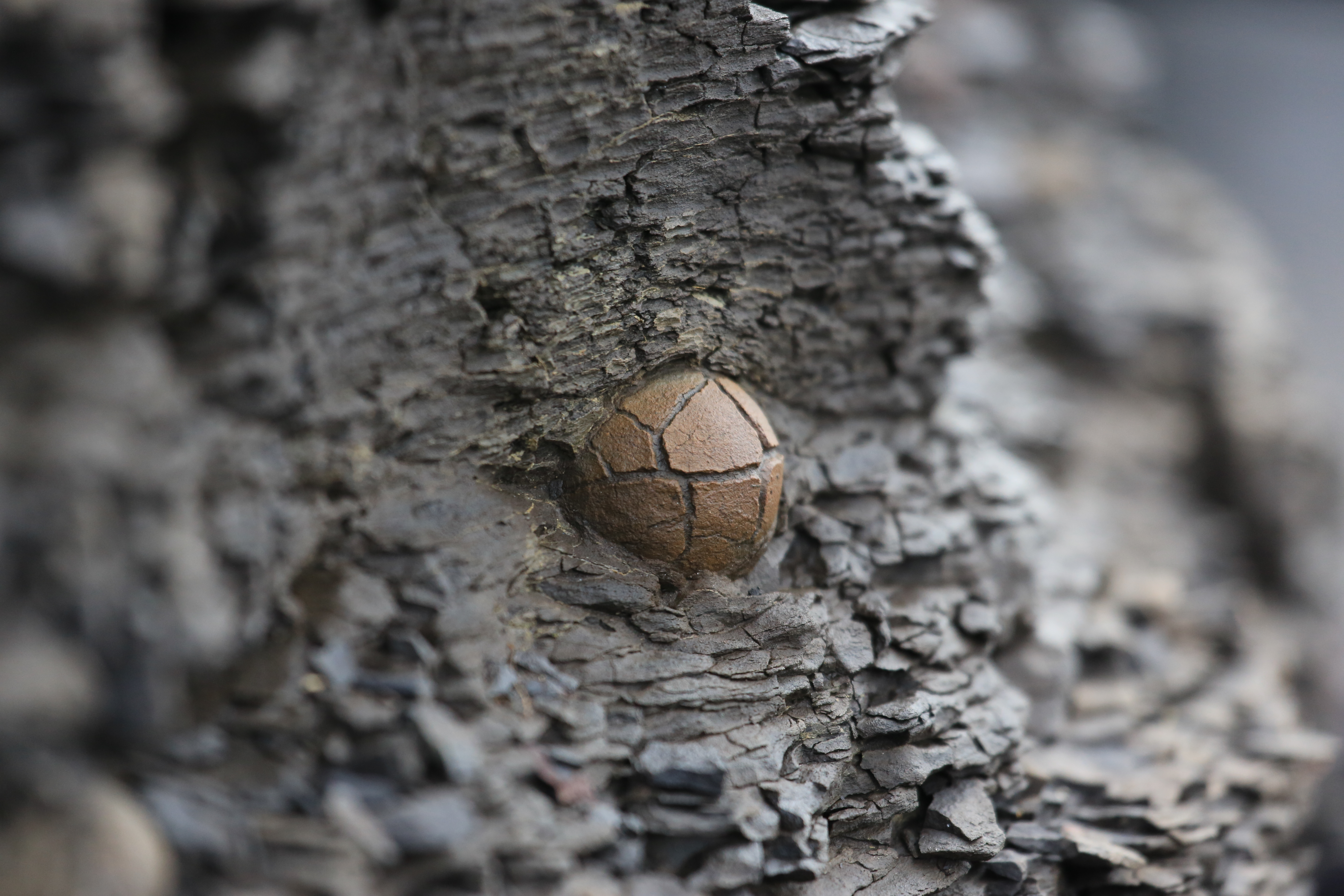 Eine in etwa Walnuss grosse Konkretion, die an einem Strand auf Spitzbergen (Svalbard) durch die Wellen teilweise freigelegt wurde. Die Konkretionen reichen dort von Erbsen- bis ca. Faustgrösse und sind beispielsweise in Schieferlagen eingebettet.